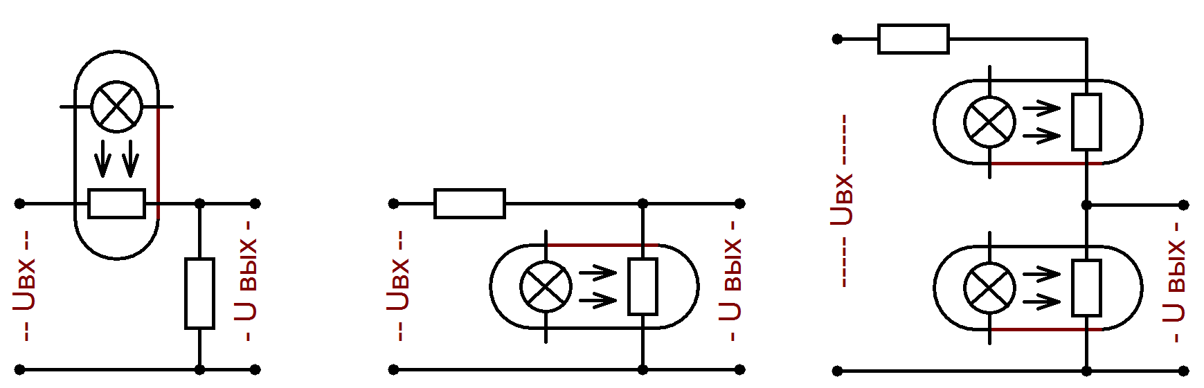 Последовательное, параллельное, последовательно-параллельное включение оптопары в регулятор уровня.